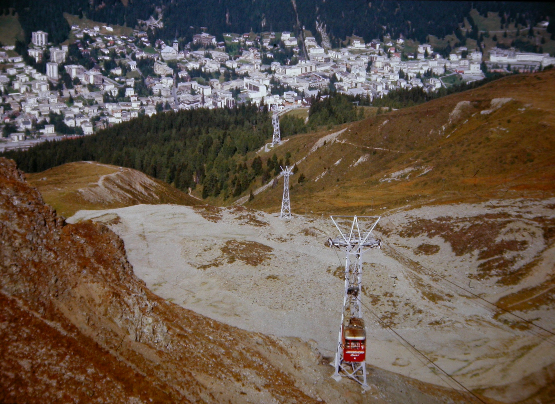 1977 September Davos